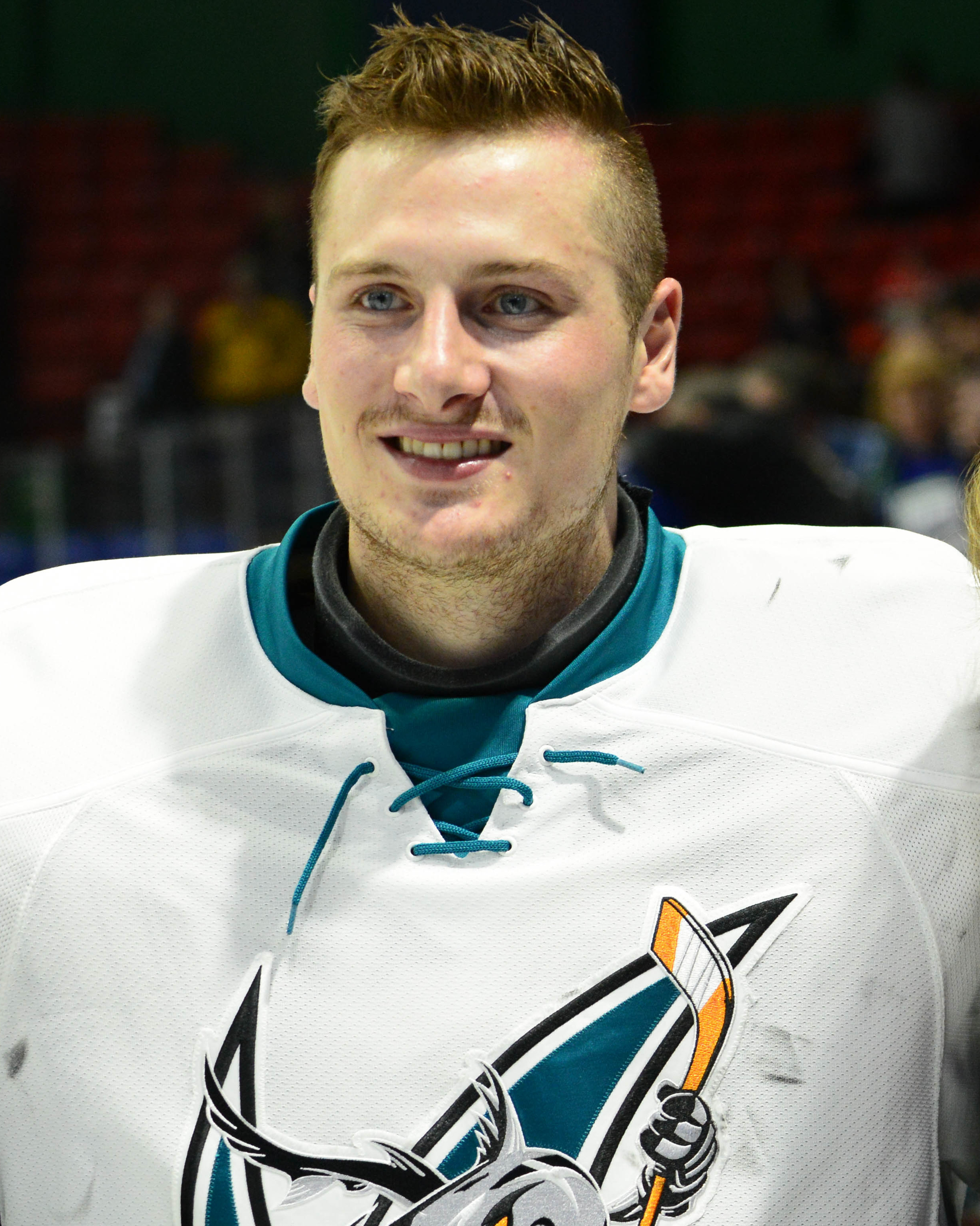 (Bryan Peck/ AHL)